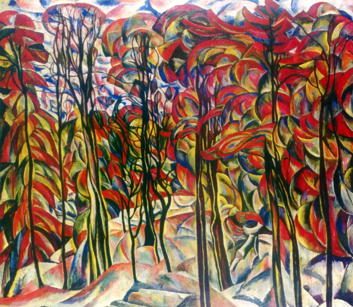 Autumn, Crotona Park, Bronxlabel QS:Len,"Autumn, Crotona Park, Bronx" label QS:Luk,"Осінь, Кротона-парк, Бронкс"